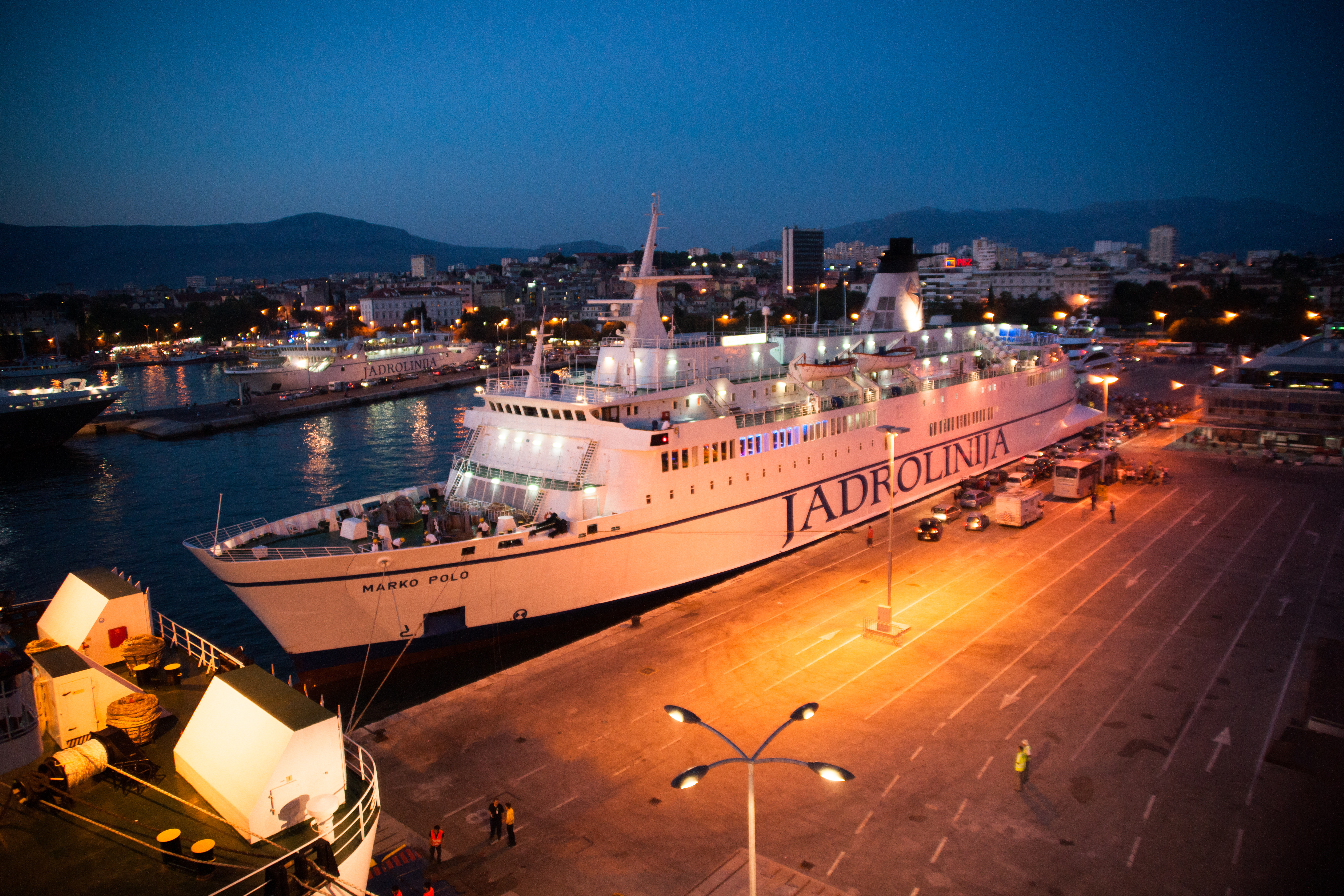 Le Marko Polo de la compagnie Jadrolinija dans le port de Split, aout 2013.